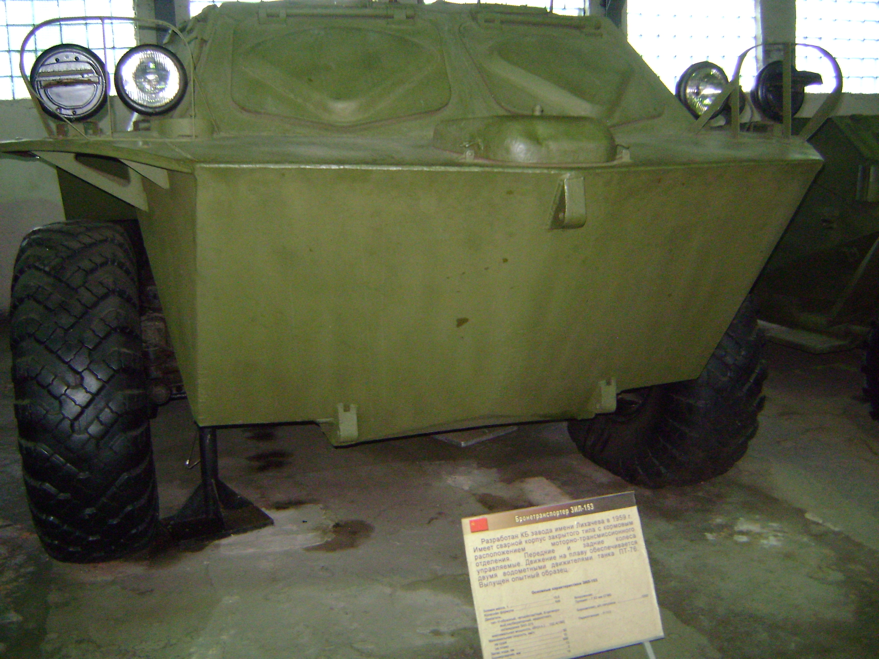 Tank Museum, Kubinka